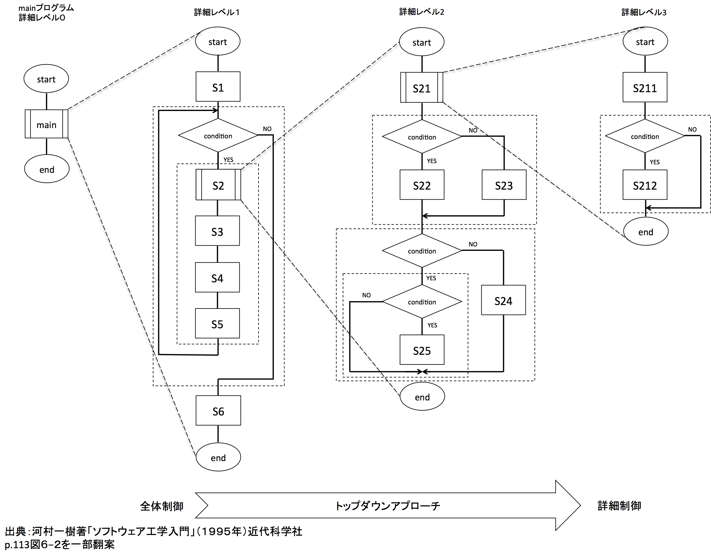 構造化プログラミングの段階的詳細化法の説明資料。Excel for mac 2010で作成。 河村一樹著「ソフトウェア工学入門」（１９９５年）近代科学社の独自表記と思われるp.113の図を一部翻案したもの。